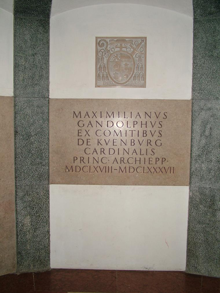 Grab Erzbischof Kuenburg in Salzburg